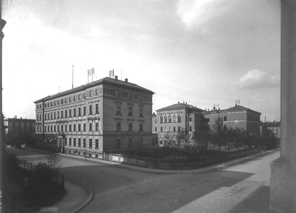 Alumnat der Thomaner, Hillerstraße 8; im Hintergrund die Neue Thomasschule, Schreberstraße 9